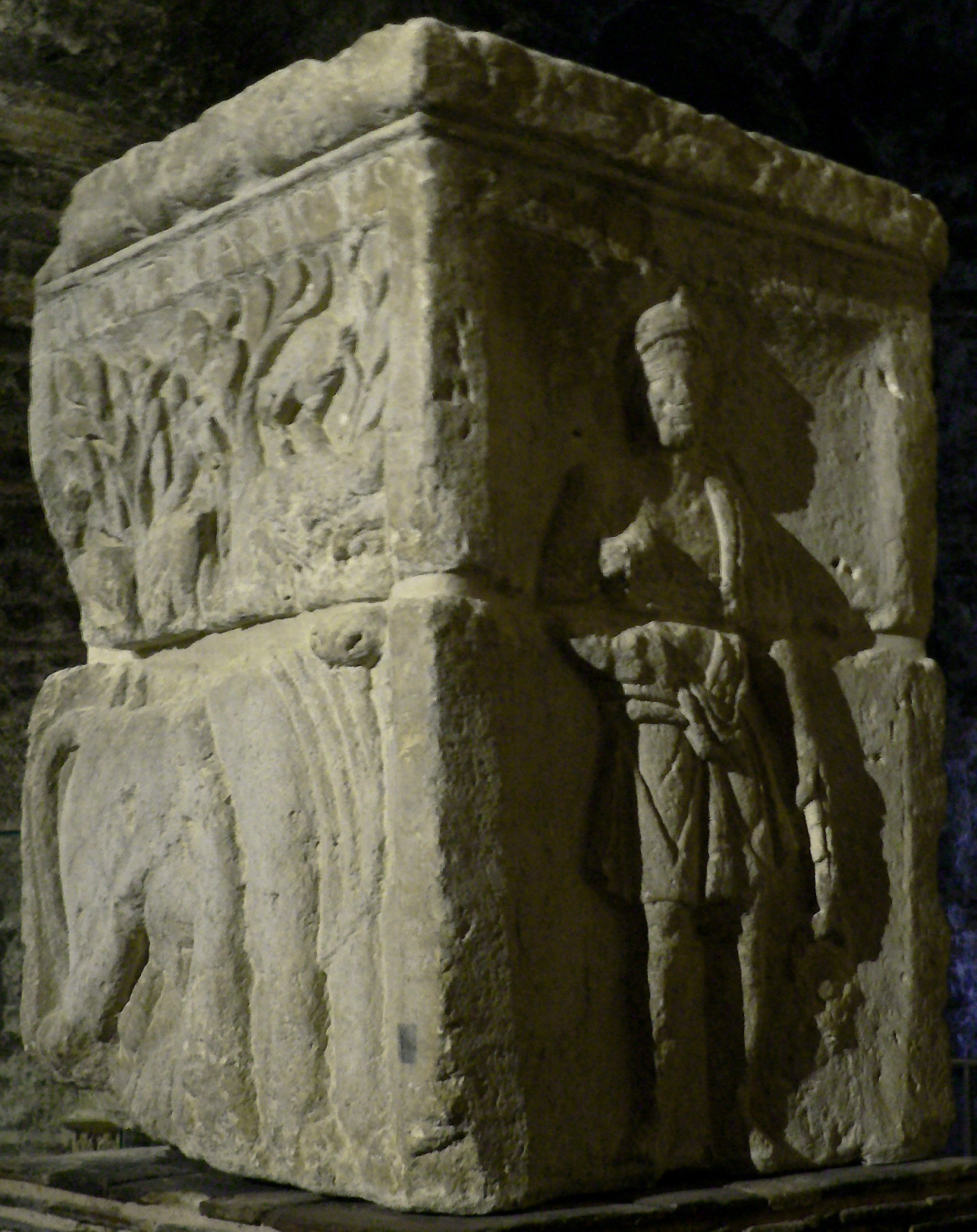 Le pilier des Nautes Taureau / Vulcain Musée National du Moyen Age, Thermes de Cluny Source : Clio20